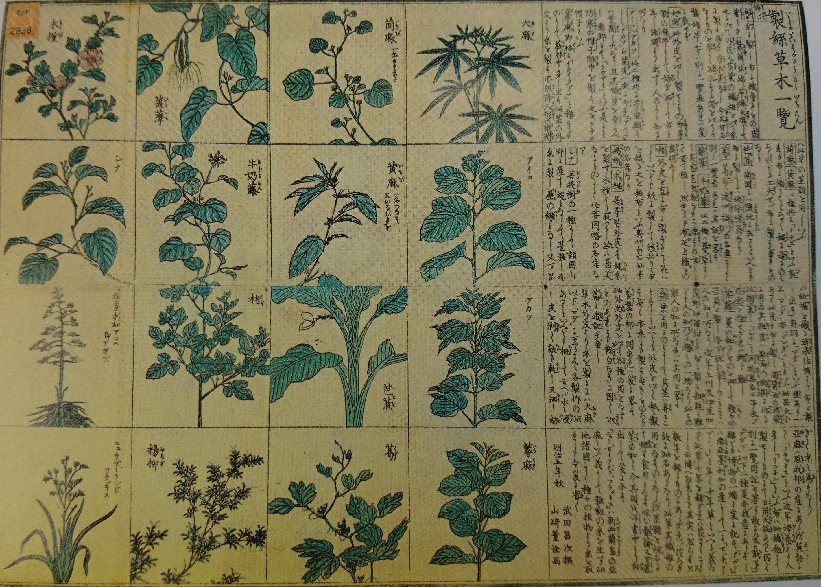 明治５年秋刊行の『教草』に掲載された木版多色刷の資料